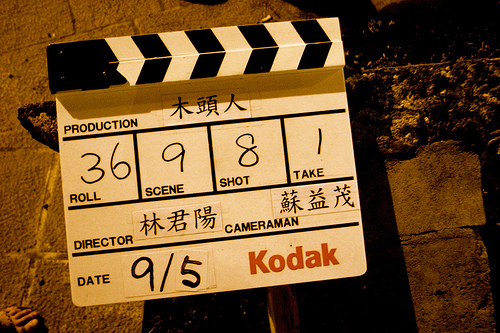 GR D@Taipei